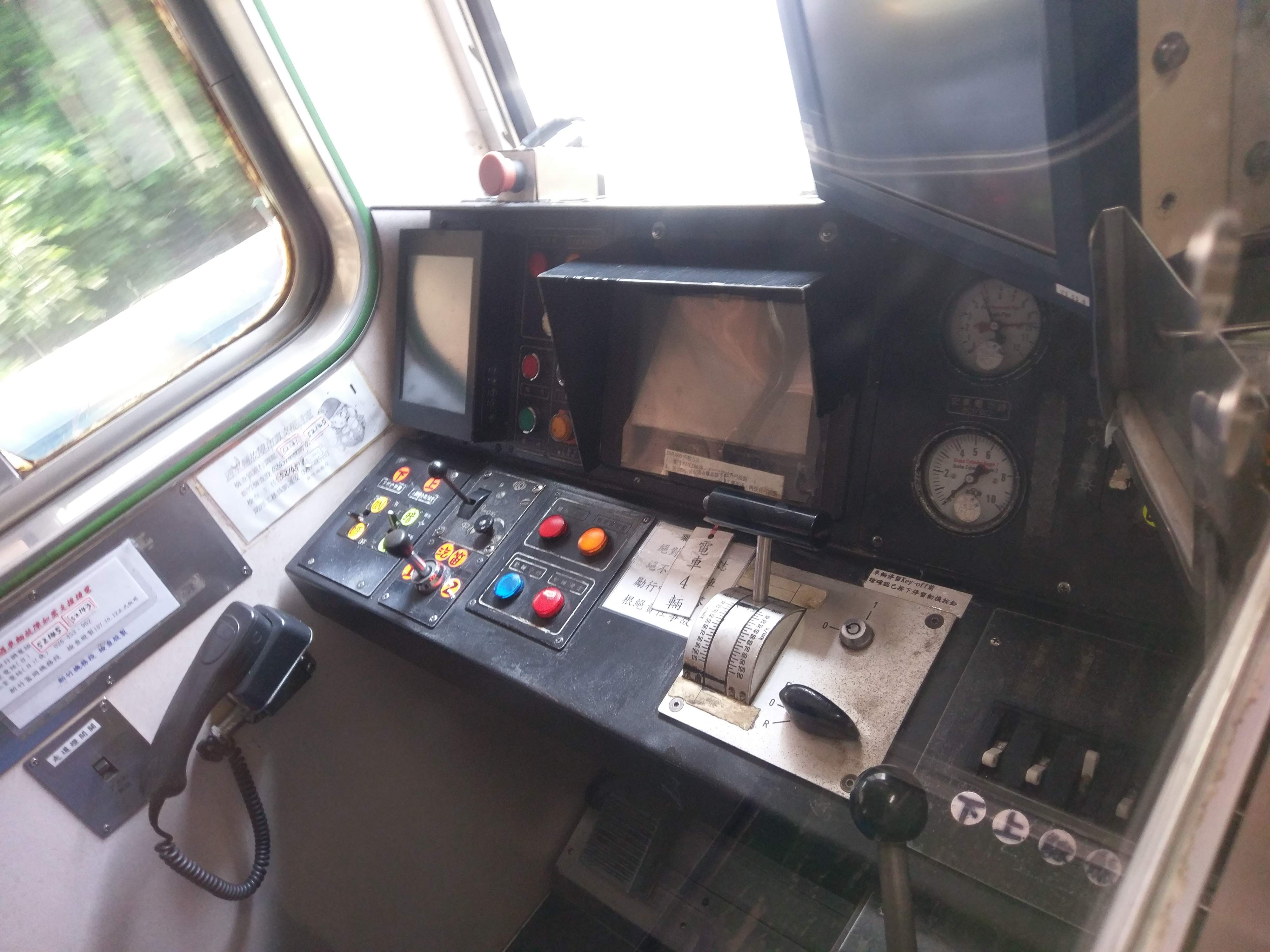 中文（台灣）: 台鐵EMU600型電聯車EM605的駕駛室